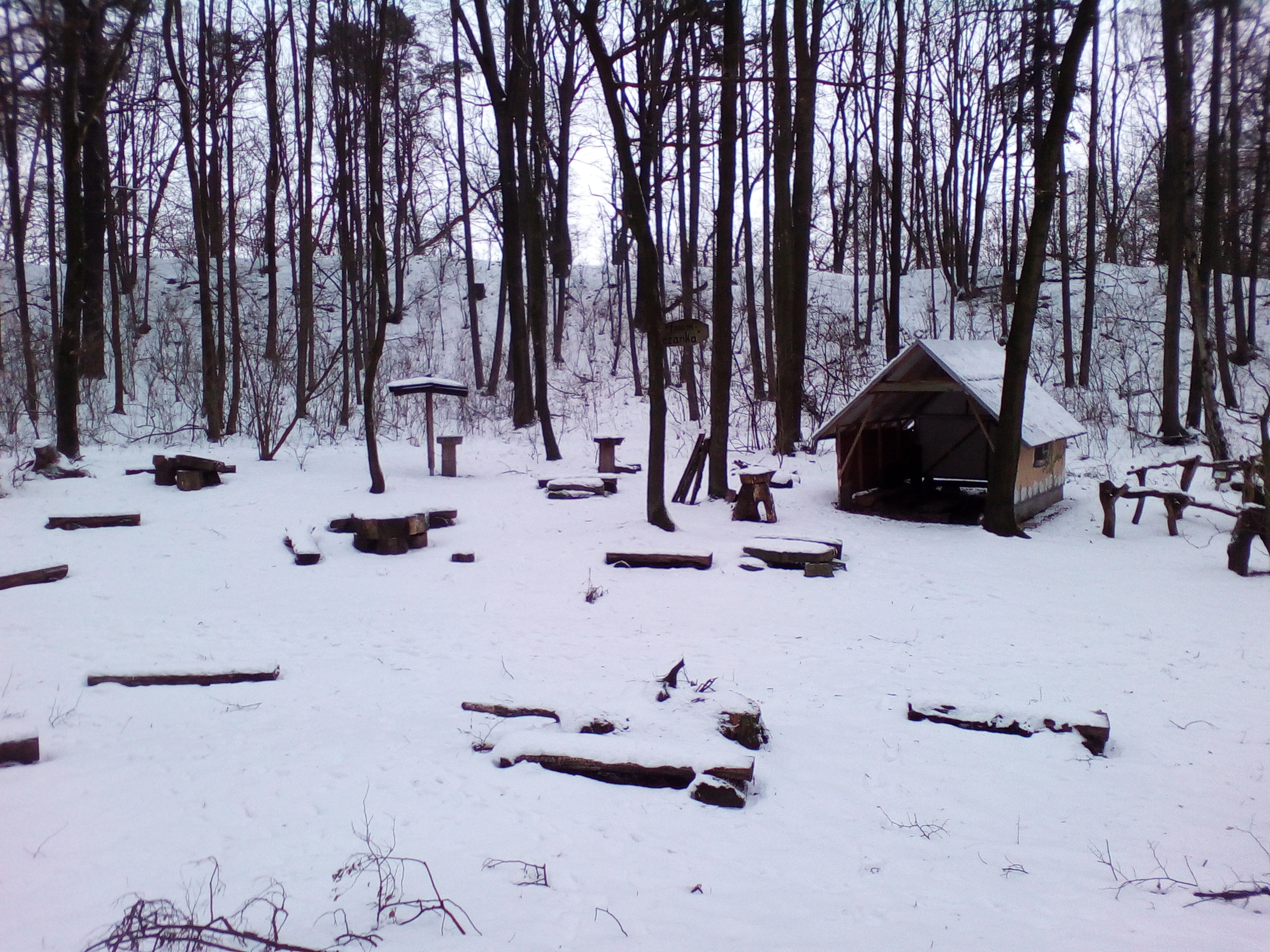 Hornjoserbsce: Wid na srjedźny dźěl Kopšinjanskeho hrodźišća w zymje.